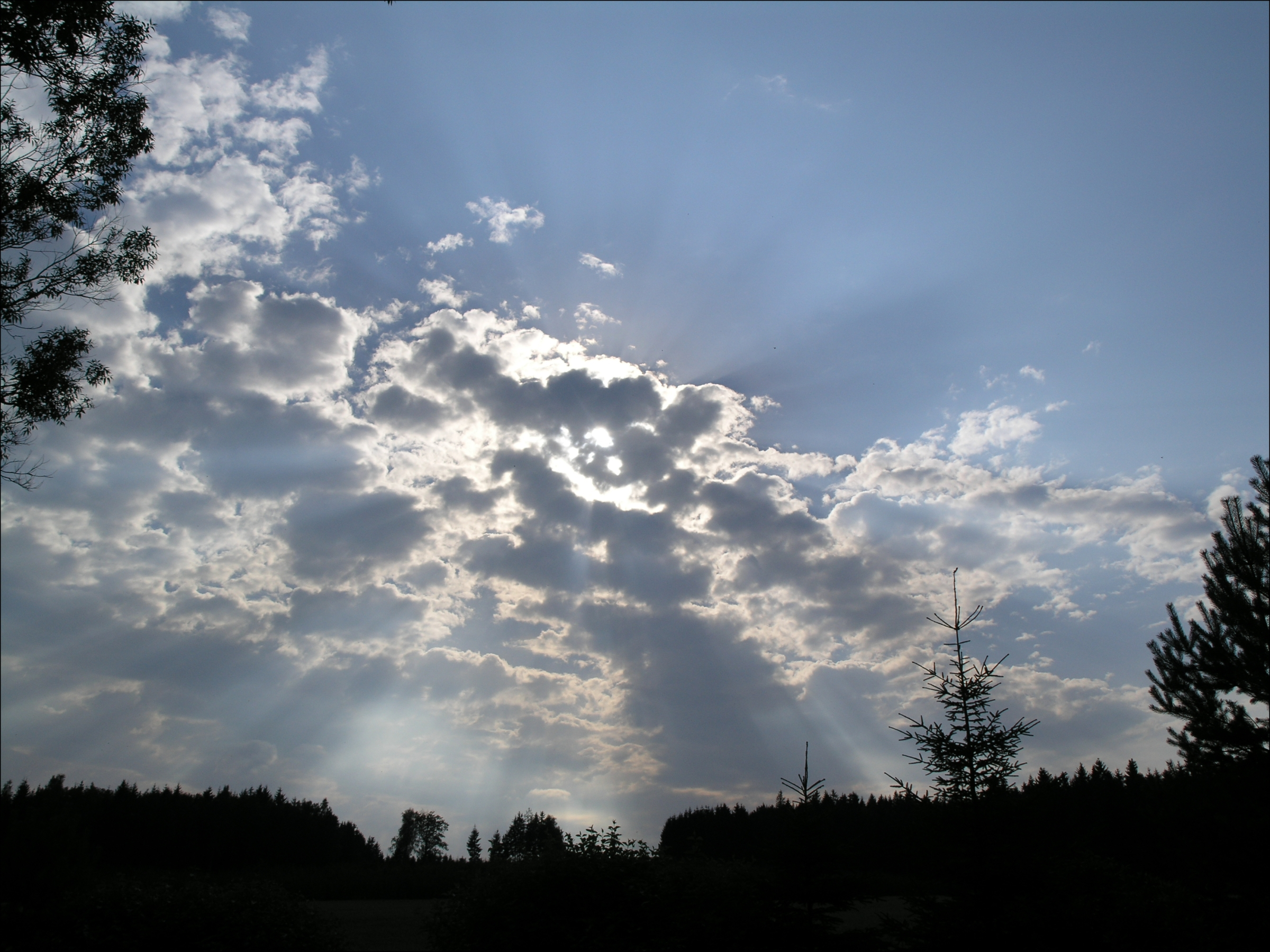 Mraky